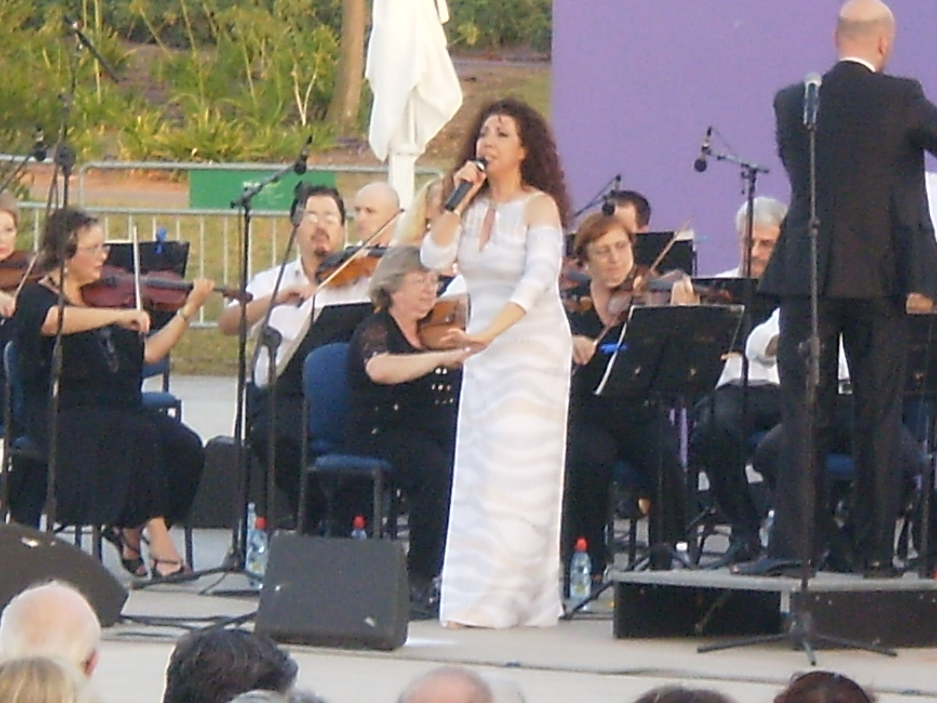 טילדה רג'ואן בהופעה, יולי 2012